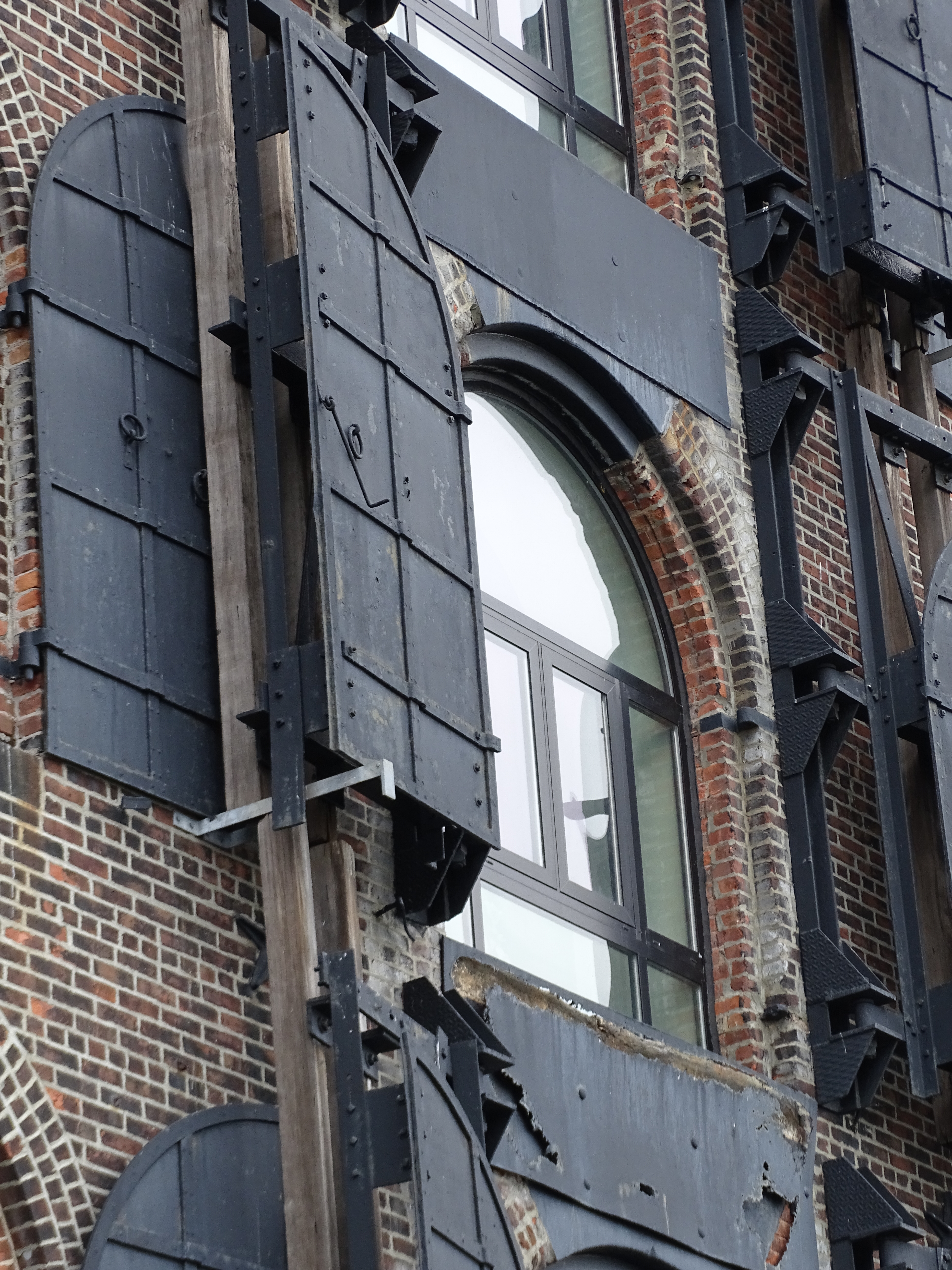 Red Hook Stores (Red Hook, Brooklyn, NY, USA), Gebäuderückwand (Detail eines Fensters)